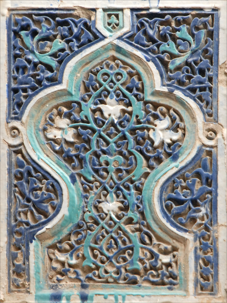 Panneau décoratif en terre cuite ciselée du portail du mausolée de Chadi Moulk Aka, une nièce de Tamerlan Chadi Moulk Aka a été ensevelie dans ce mausolée en 1372, sa soeur ainée Tourkhan Aka l'y a rejointe en 1386. _________ Shah-i-Zinda est la nécropole du "Roi vivant", en raison de l'existence d'une légende liée à la mort de Qassim-ibn-Abbas, protecteur de Samarcande et Saint islamique. Shah-i-Zinda est accessible par un escalier datant du XVIIIème siècle qui a remplacé un chemin, l'ensemble est composé de mosquées et de mausolées construits sur la colline d'Afrosyab (le lieu de l'antique Samarcande). Le mausolée du cousin du Prophête : Qassim-ibn-Abbas, a été construit le premier à cet endroit au XIème siècle, puis réaménagé au XIVème siècle, car c'était devenu le principal lieu saint de la ville. Ce missionnaire musulman était arrivé en Sogdiane en 676 au moment de la conquête arabe. De nombreuses tombes ont été construites à proximité de celle du Saint dans les siècles qui ont suivi, donnant naissance à cet ensemble majeur du patrimoine islamique de Samarcande.